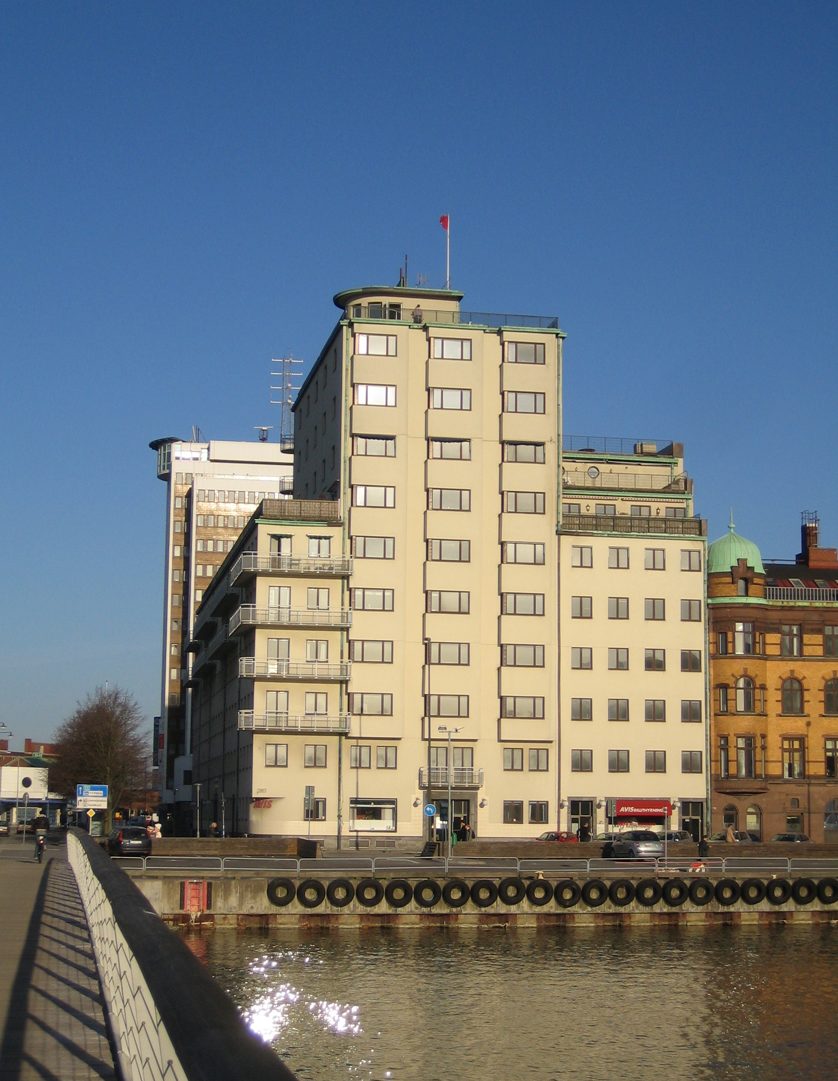 Kolgahuset in Malmö harbour